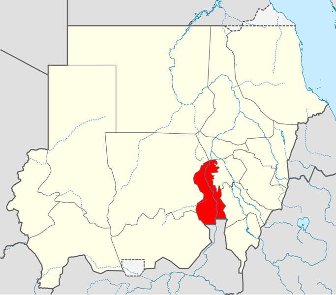 Locator map